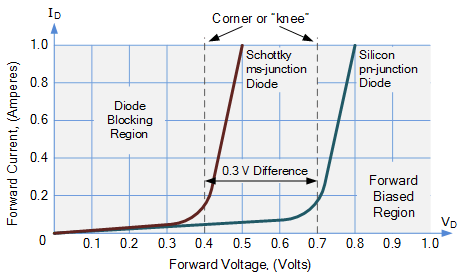 Erinevused nende vahel